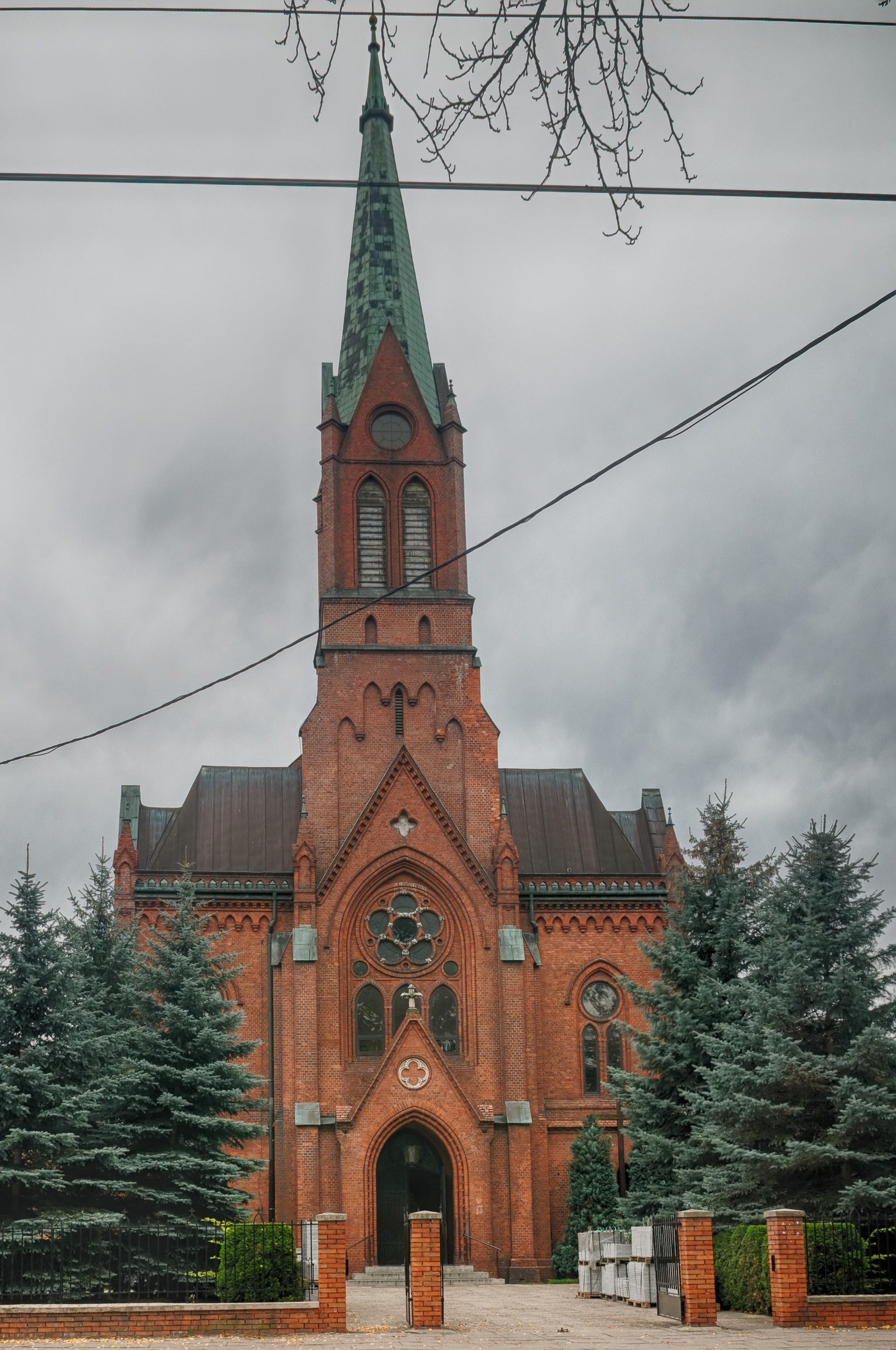 Żyrardów, ul. Żeromskiego 7 - kościół ewangelicki, 2 poł. XIX w. (zabytek nr 1262 z 22.05.1975)